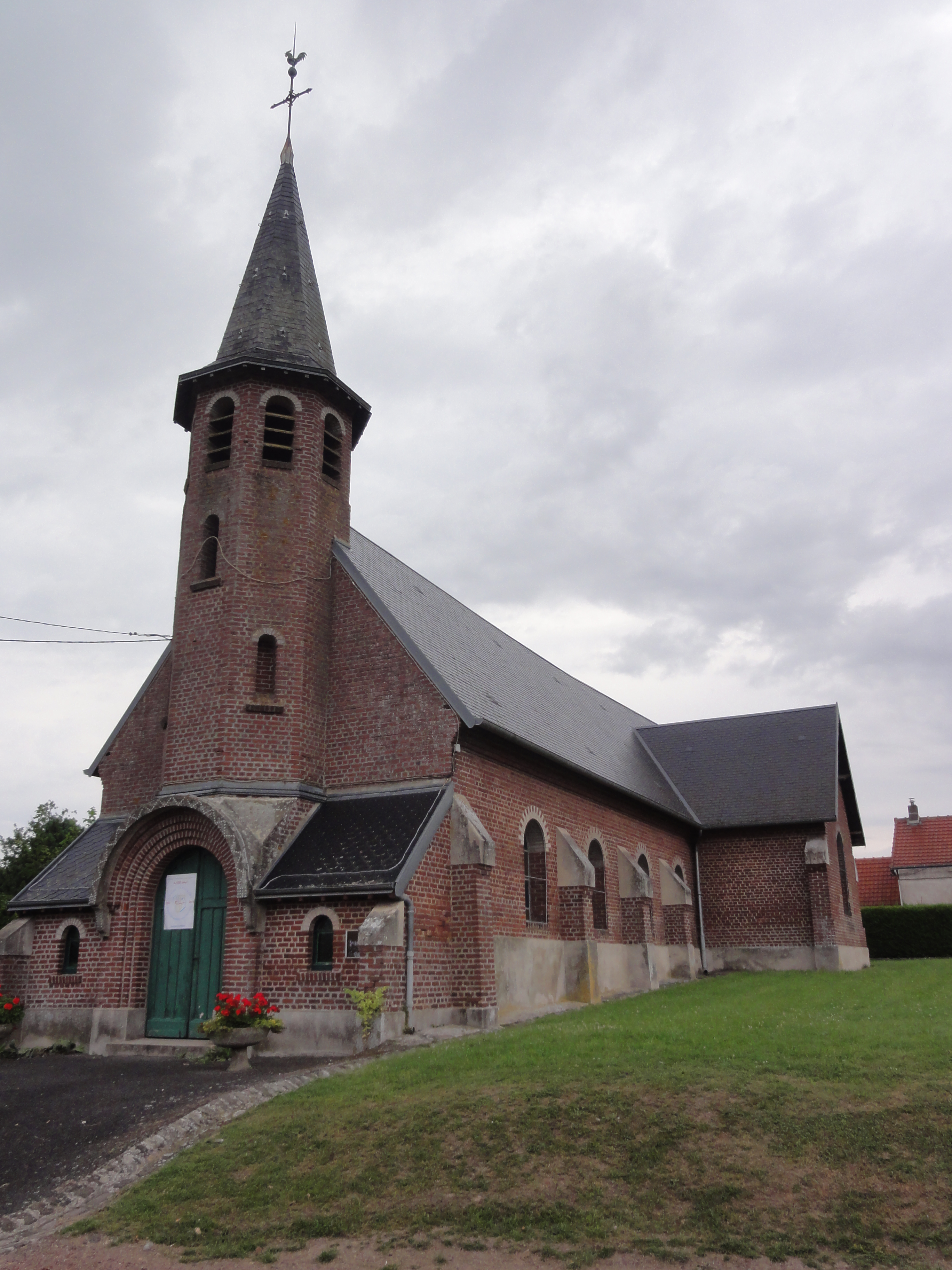 Levergies (Aisne) église